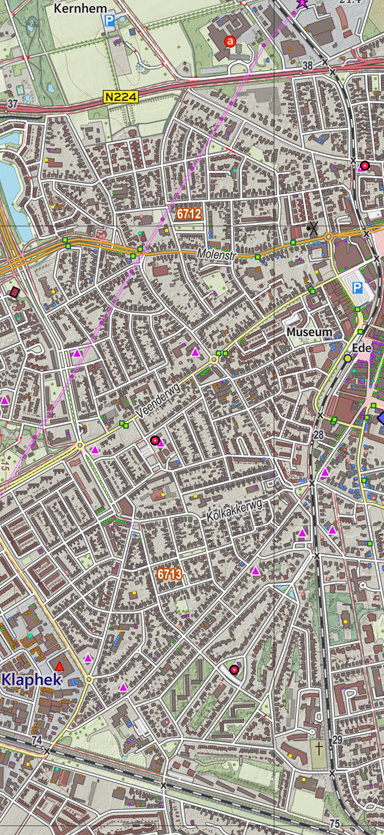 Topografische kaart van Ede (woonplaats). Resolutie: 300 pixels/km. Kaartbeeld samengesteld uit de open geodata van de Top10NL en Top25namen (Basisregistratie Topografie, Kadaster), Creative Commons BY licentie. Gebouwvlakken uit open geodata BAG extract. Wegen uit de OpenStreetMap, OpenStreetMap community. Reliëfschaduw uit de Actuele Hoogtekaart AHN2. Samenstelling en kleurenschema: Jan-Willem van Aalst, met QGIS2. Zie ook de Legenda.